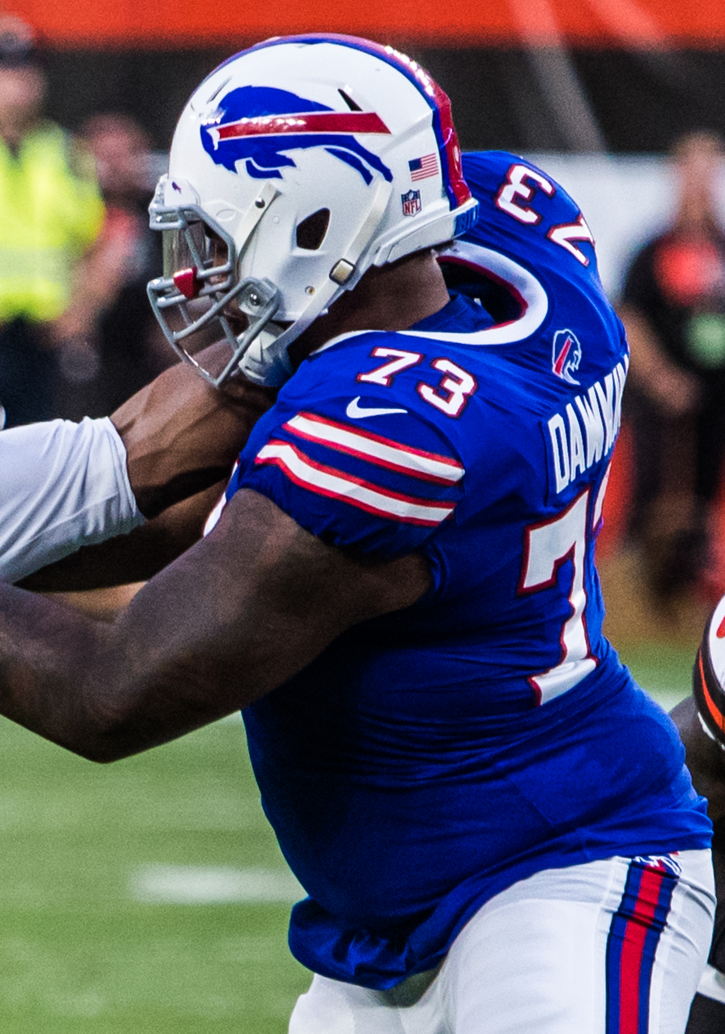 Myles Garrett